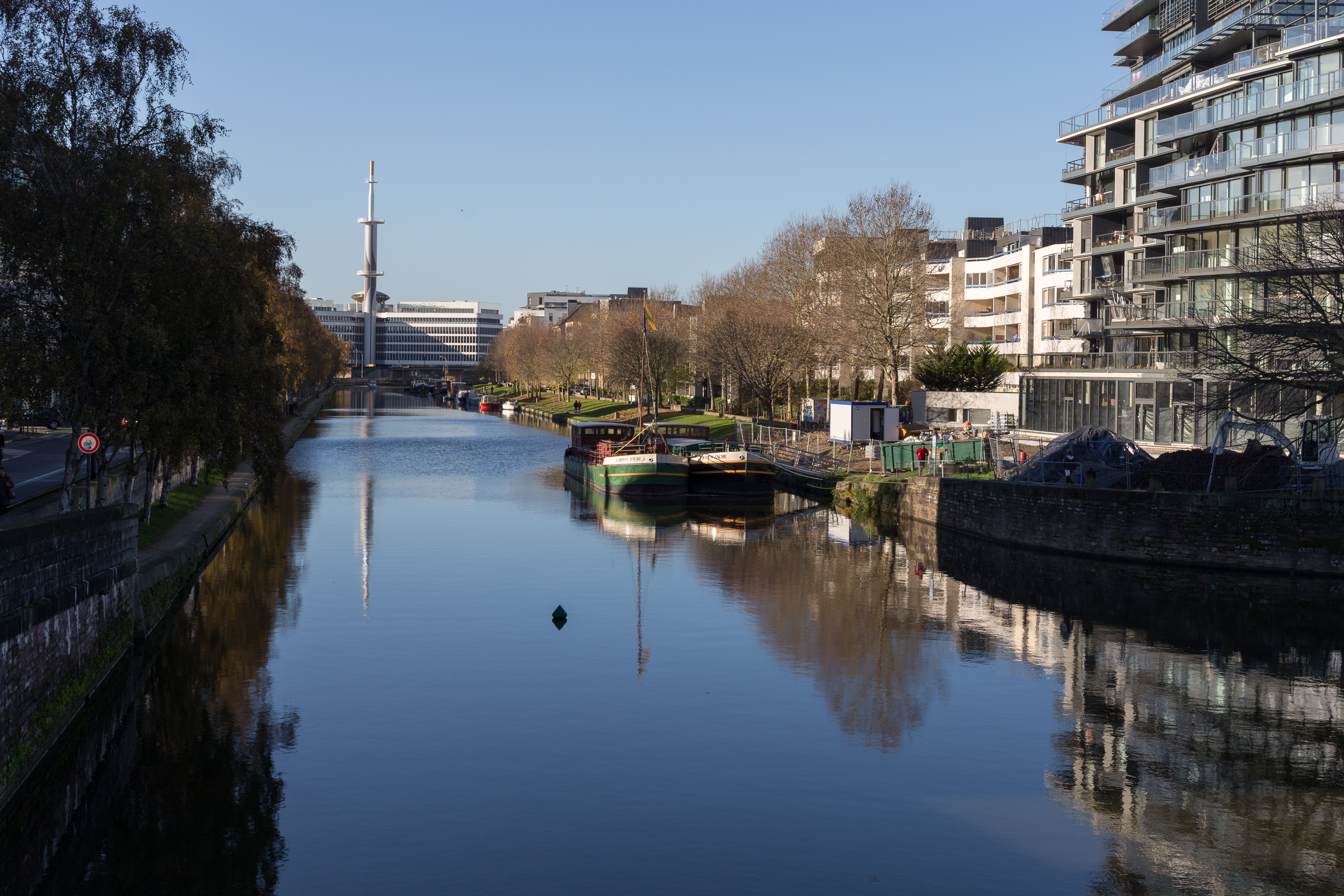 La Vilaine à Rennes : le quai Saint-Cyr vu du pont de Bretagne.